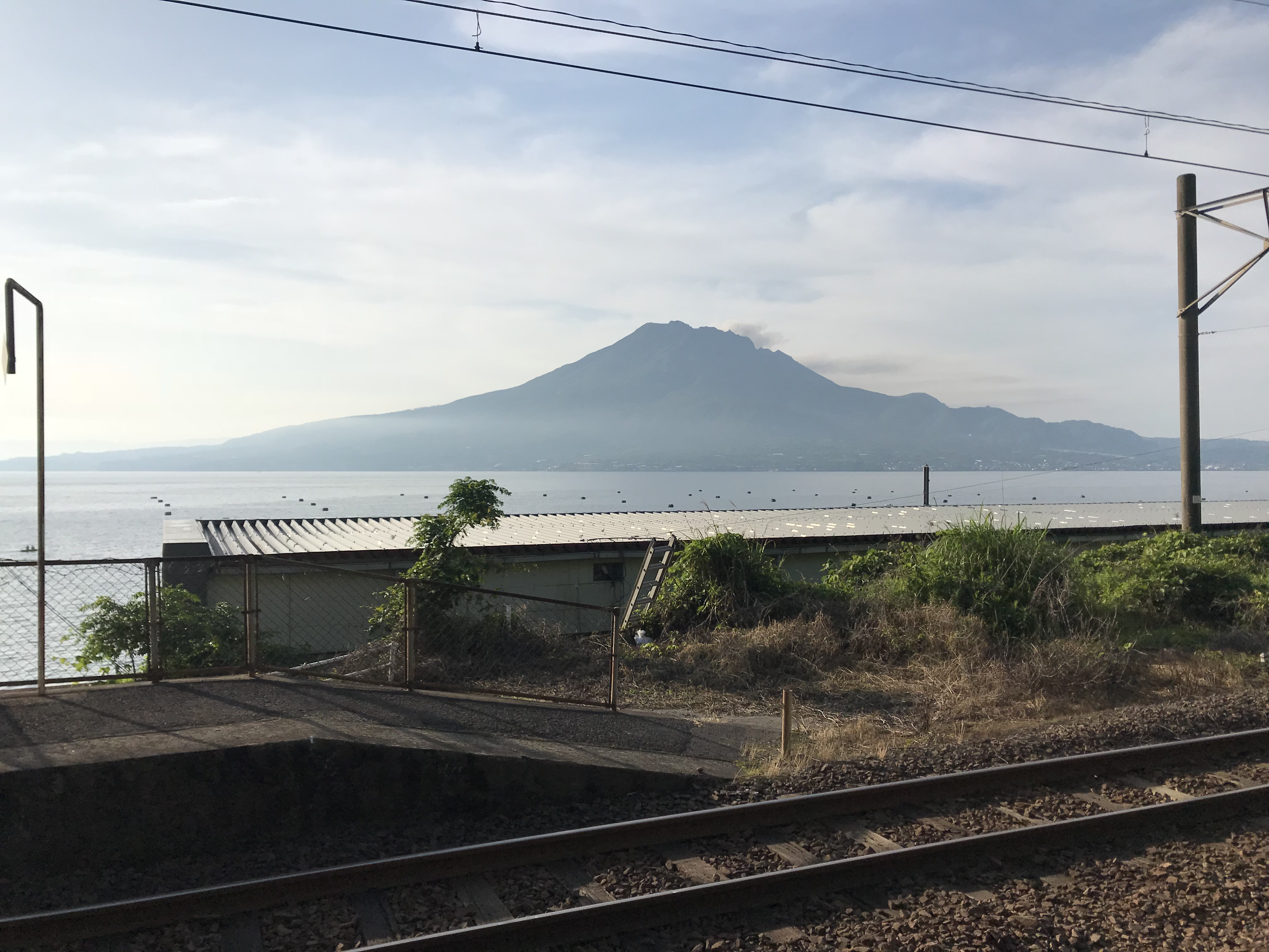 竜ヶ水駅のホームより望む鹿児島湾と桜島